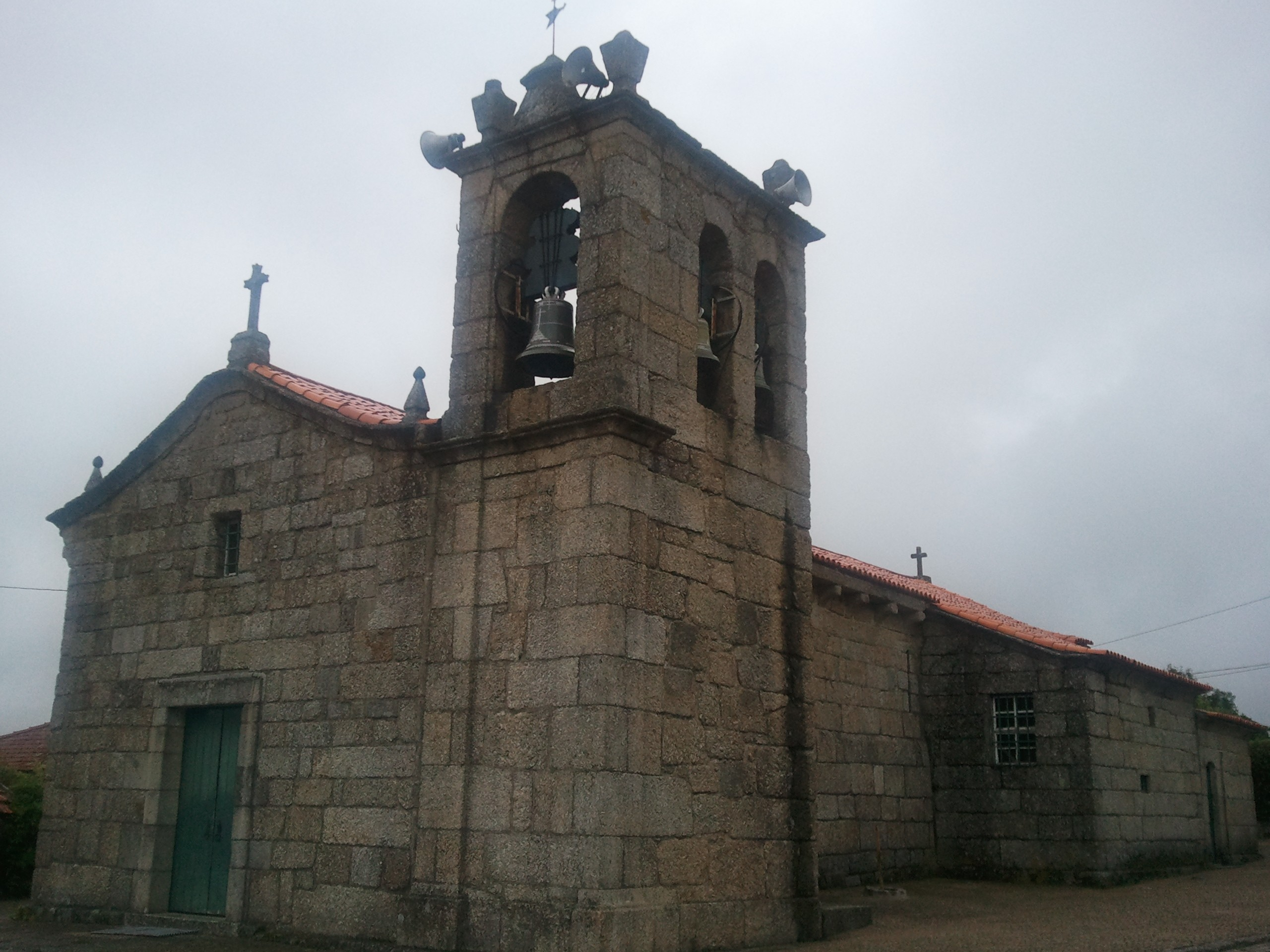 Igreja Matriz de São Martinho de Candoso